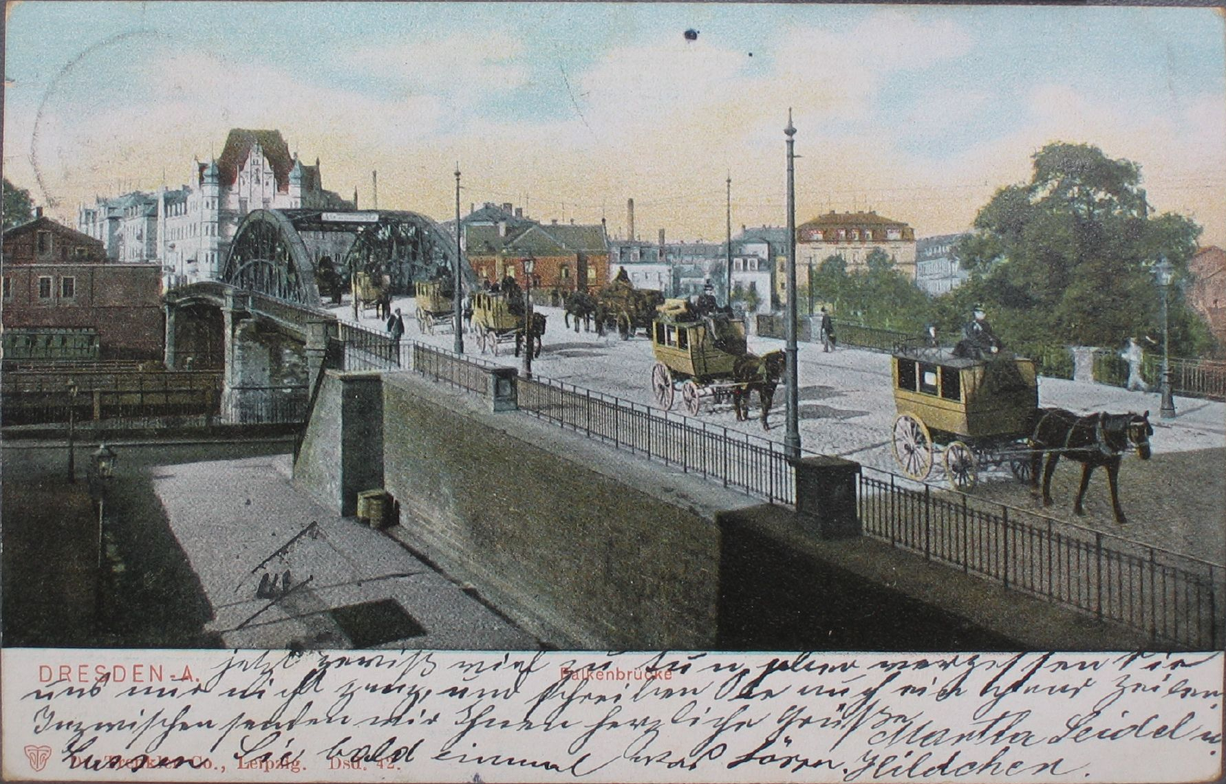 Ansichtskarte Dresden Falkenbrücke, Poststempel 11.11.1905